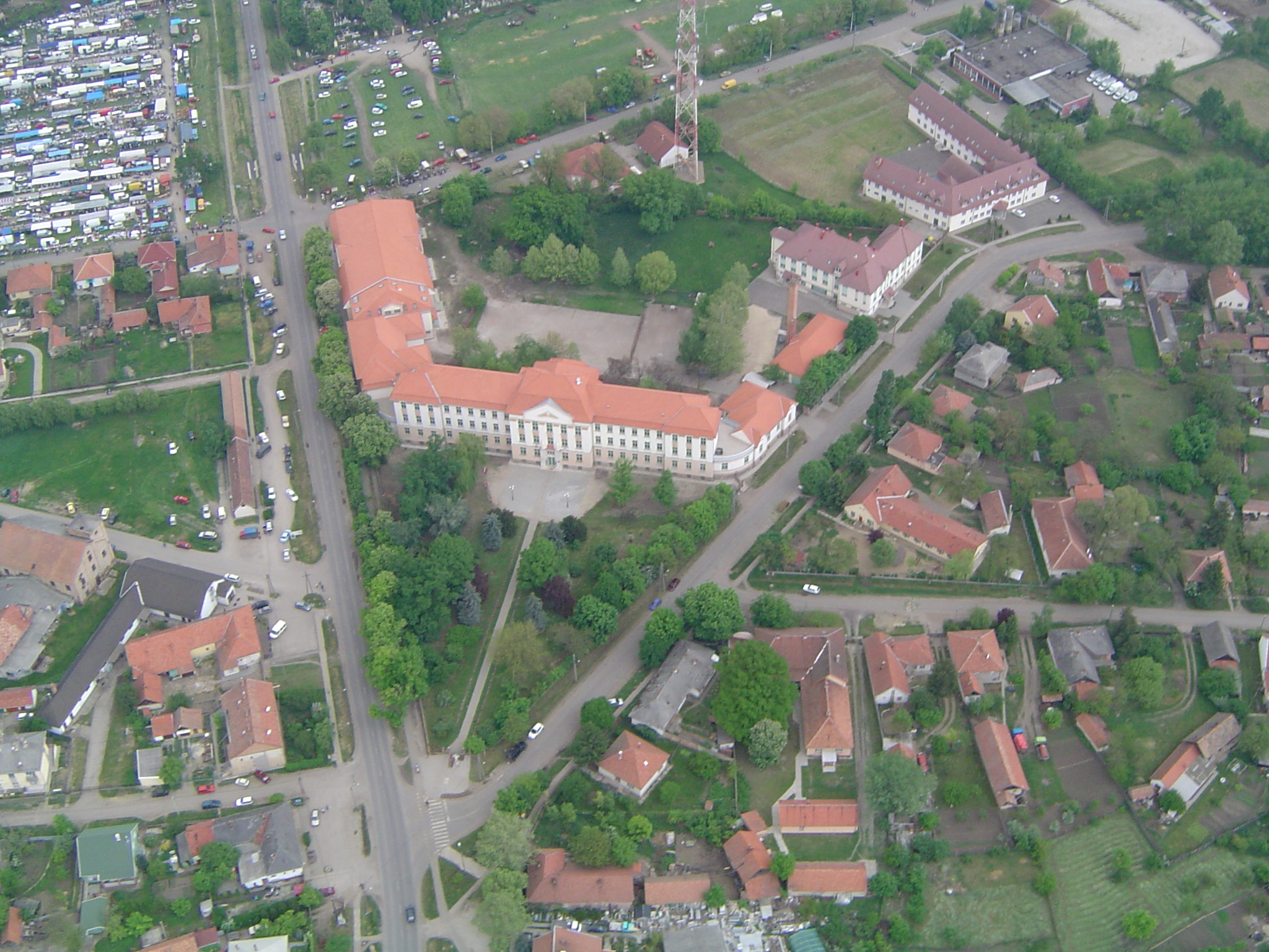 Mészáros Lőrinc Gimnázium, Szakképző Iskola (Jászapáti)